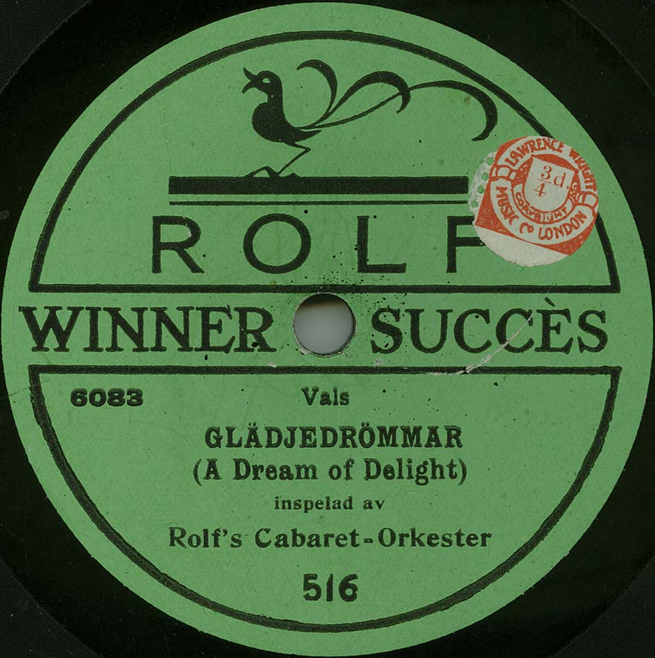 Etikett till utgåva på skivmärket Rolf Winner Succès, ägt av revystjärnan Ernst Rolf.